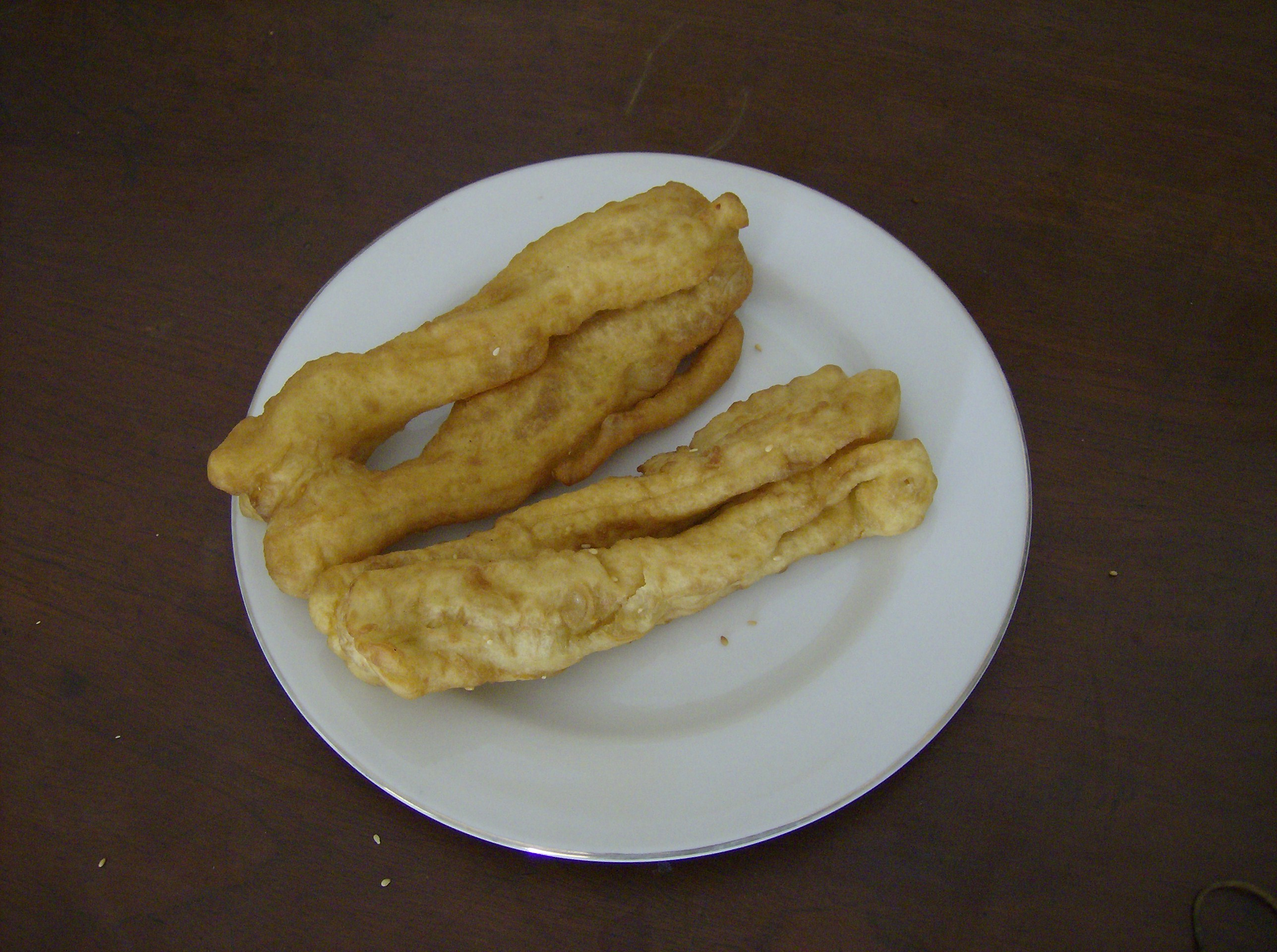 Cakwe from Surakarta